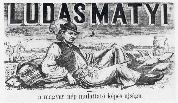 A 19. században (1867-től) jelent meg a szélsőbaloldali Ludas Matyi című élclap. A magyar nép mulattató képes újságja alcímű ős-Ludas öt évig jelent meg, főszerkesztője, Mészáros Károly egy ízben két év börtönbüntetést kapott egy Ferenc Józsefet megfeszített Krisztusként ábrázoló karikatúra miatt.